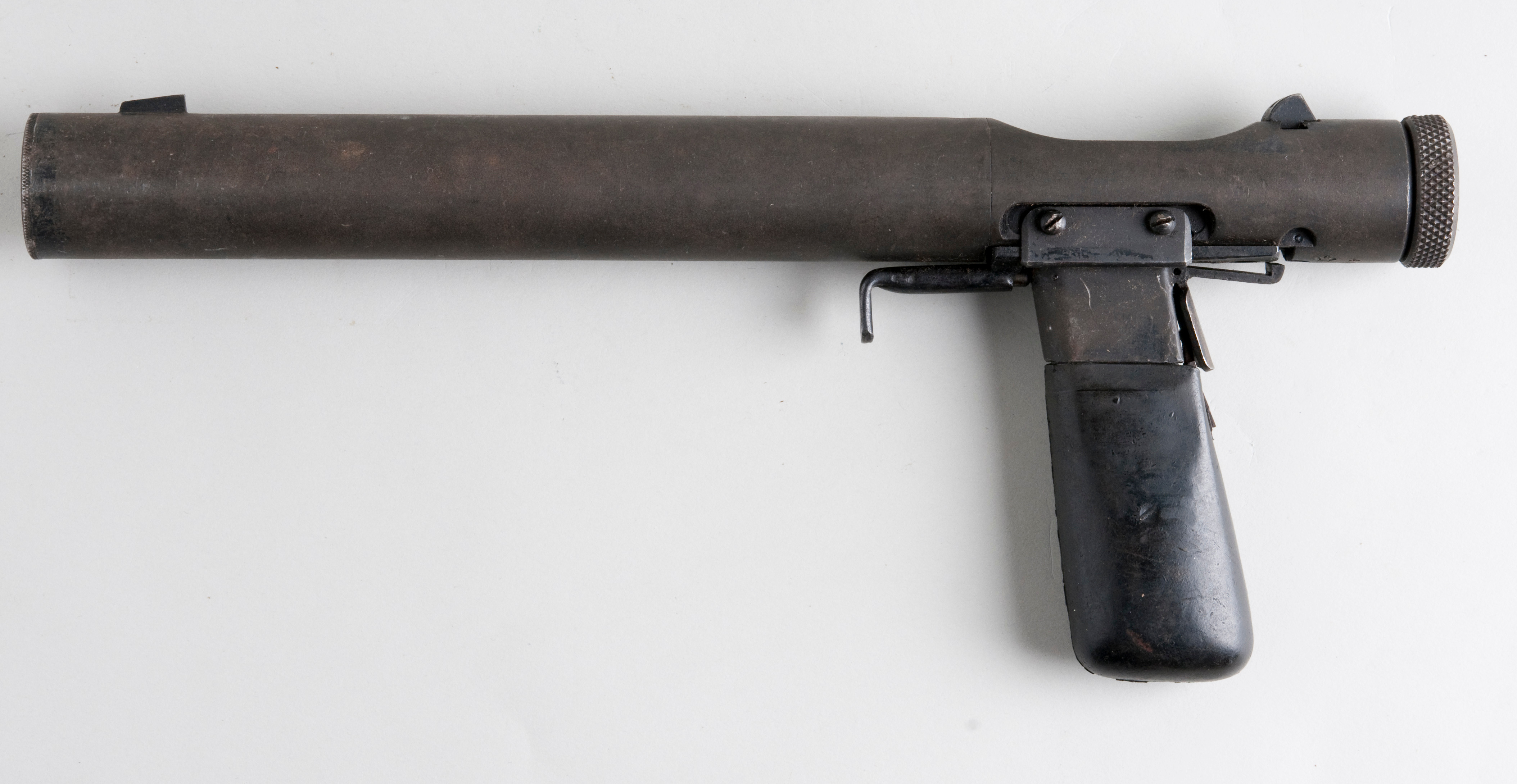 Welrod Mk IIA From flickr user handvapensamlingen - Pistols used in Norway.